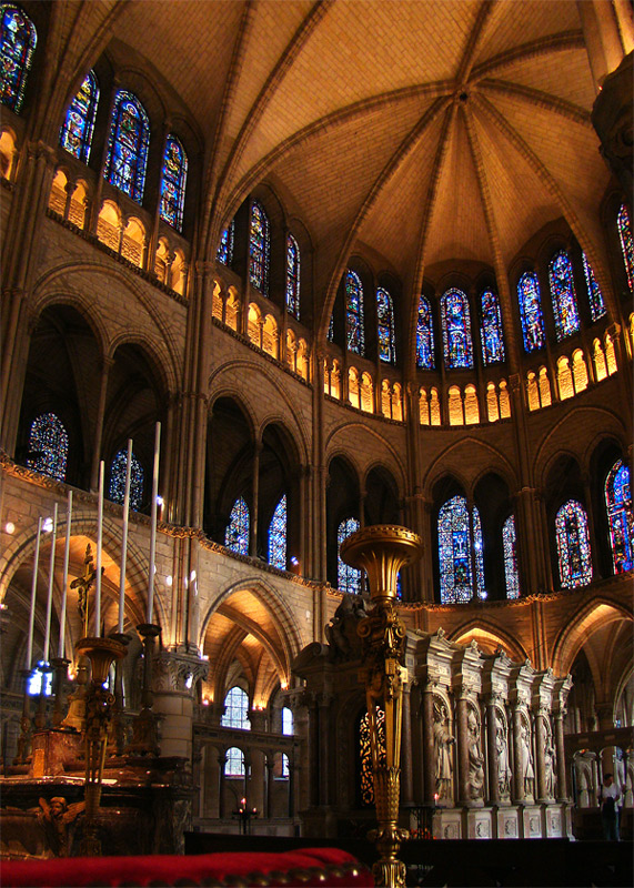 Basilique Saint-Remi, Reims, Champagne-Ardenne, France. Tombeau de saint Remi au milieu du chœur.